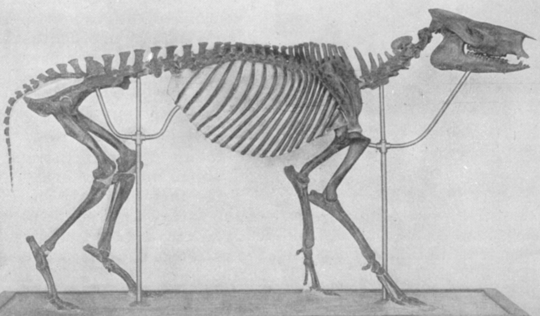 Hyrachyus skeleton.